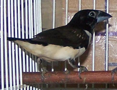 L. fringilloides